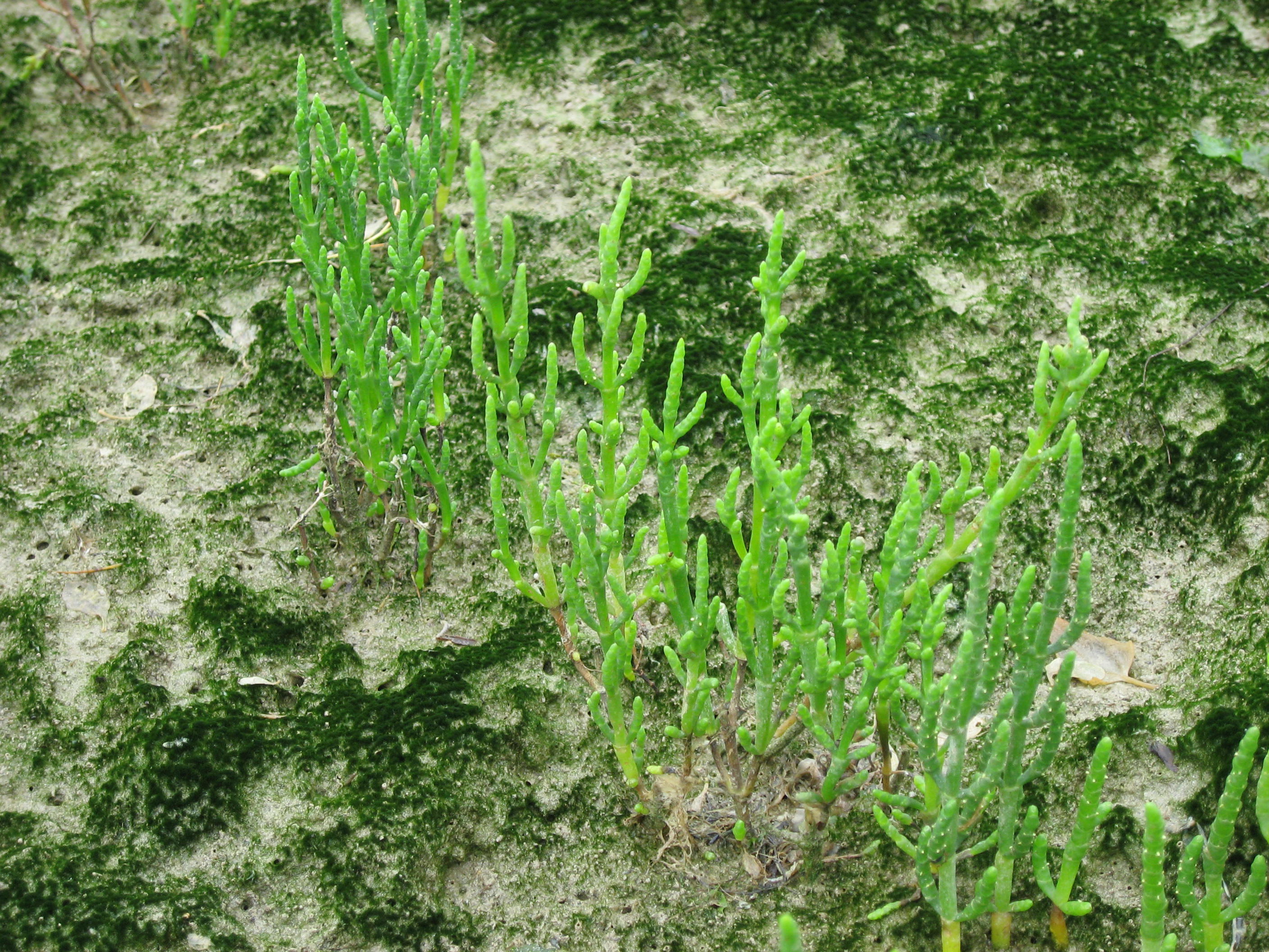 Salicorne (Salicornia europaea) in Baie de Somme Map: 50° 11' 40" N 1° 38' 54" E